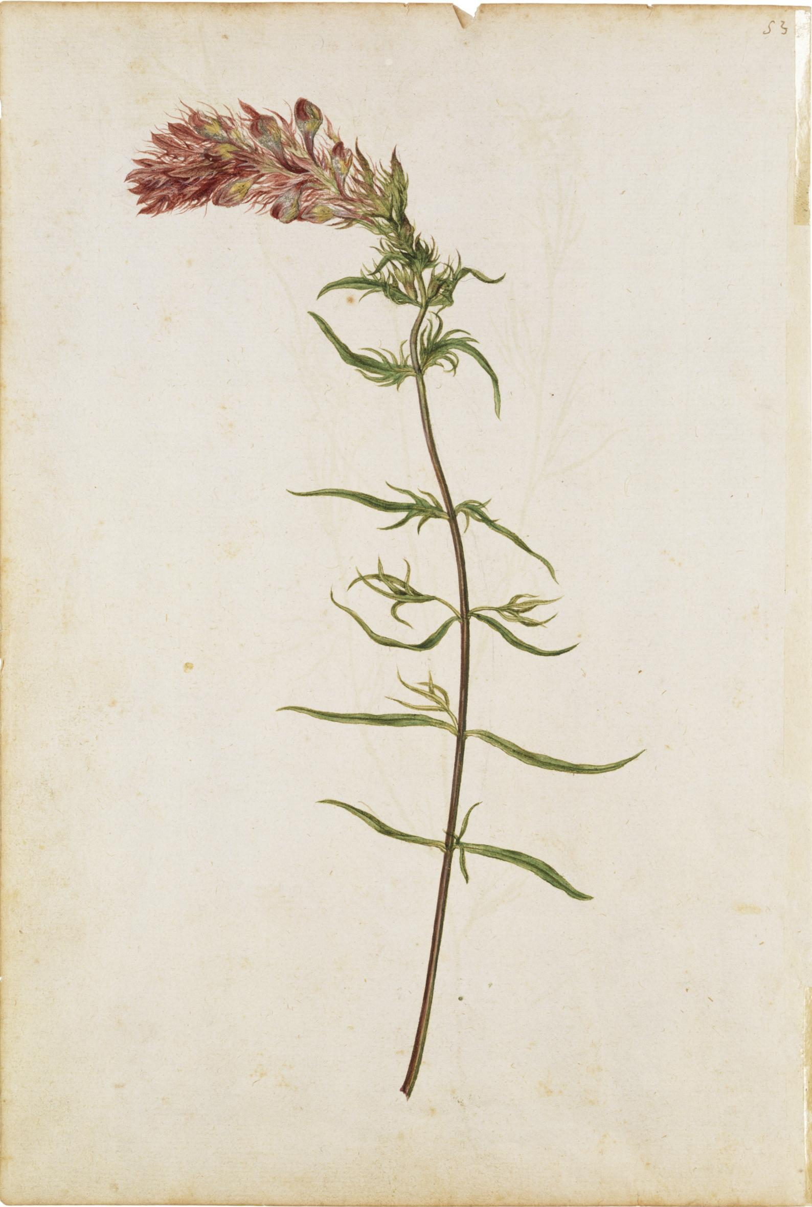 Жак Ле Муан. Братаўка палявая